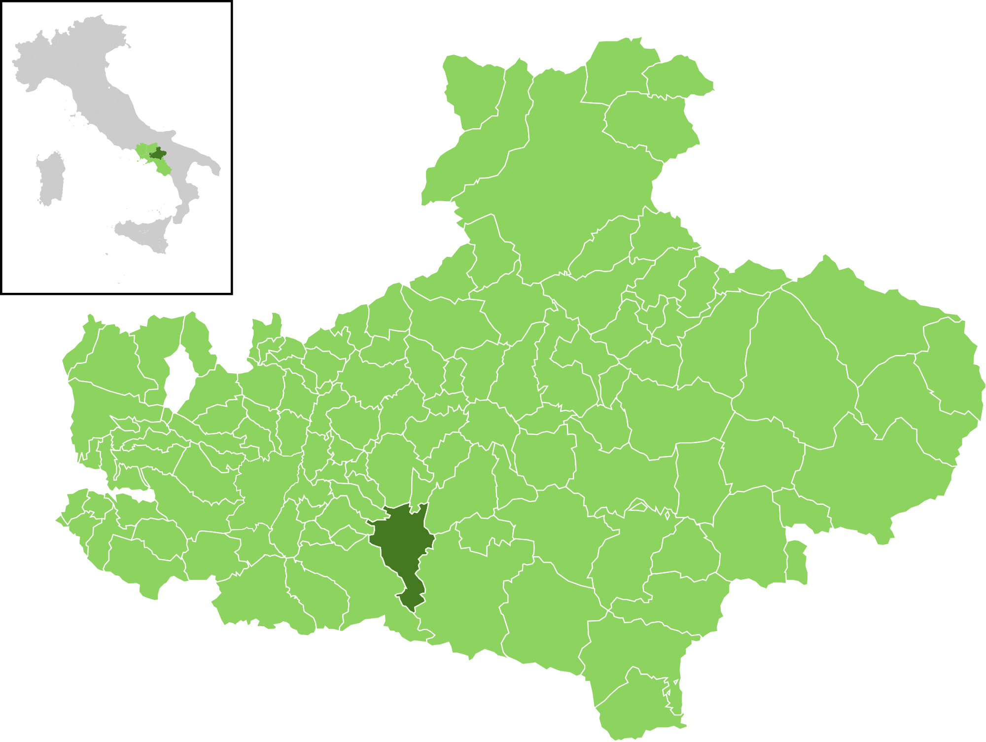 Posizione del comune all'interno della provincia di Avellino